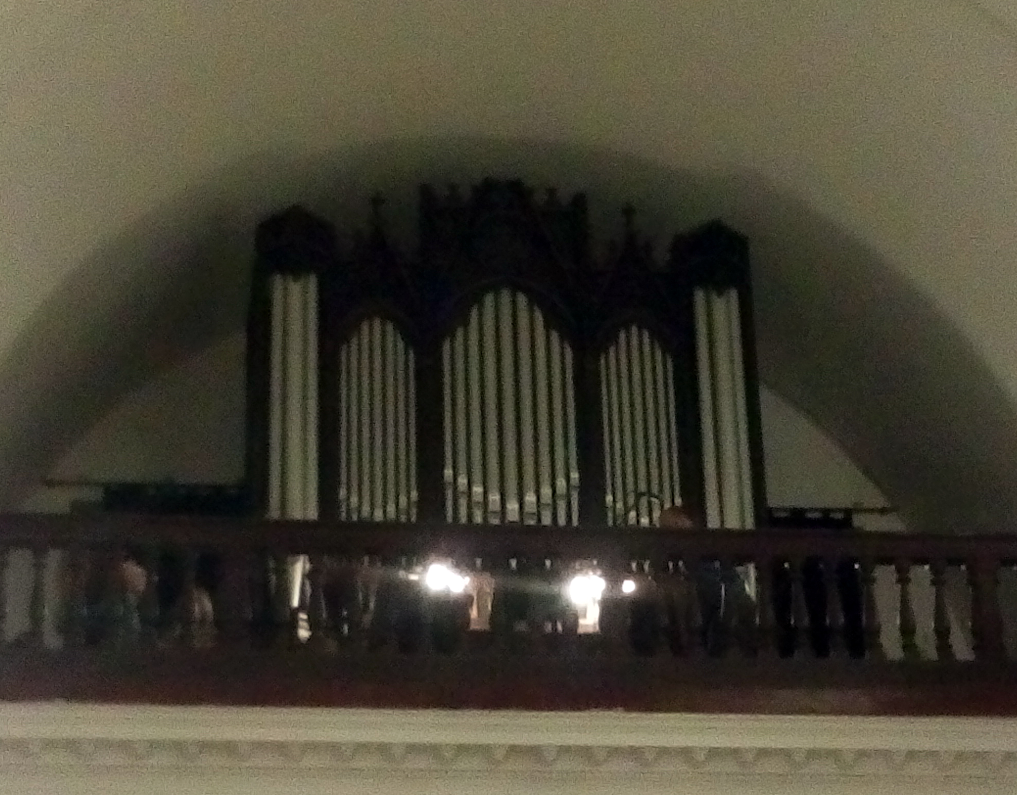 Santuario de Nuestra Señora de los Milagros (Santa Fe)